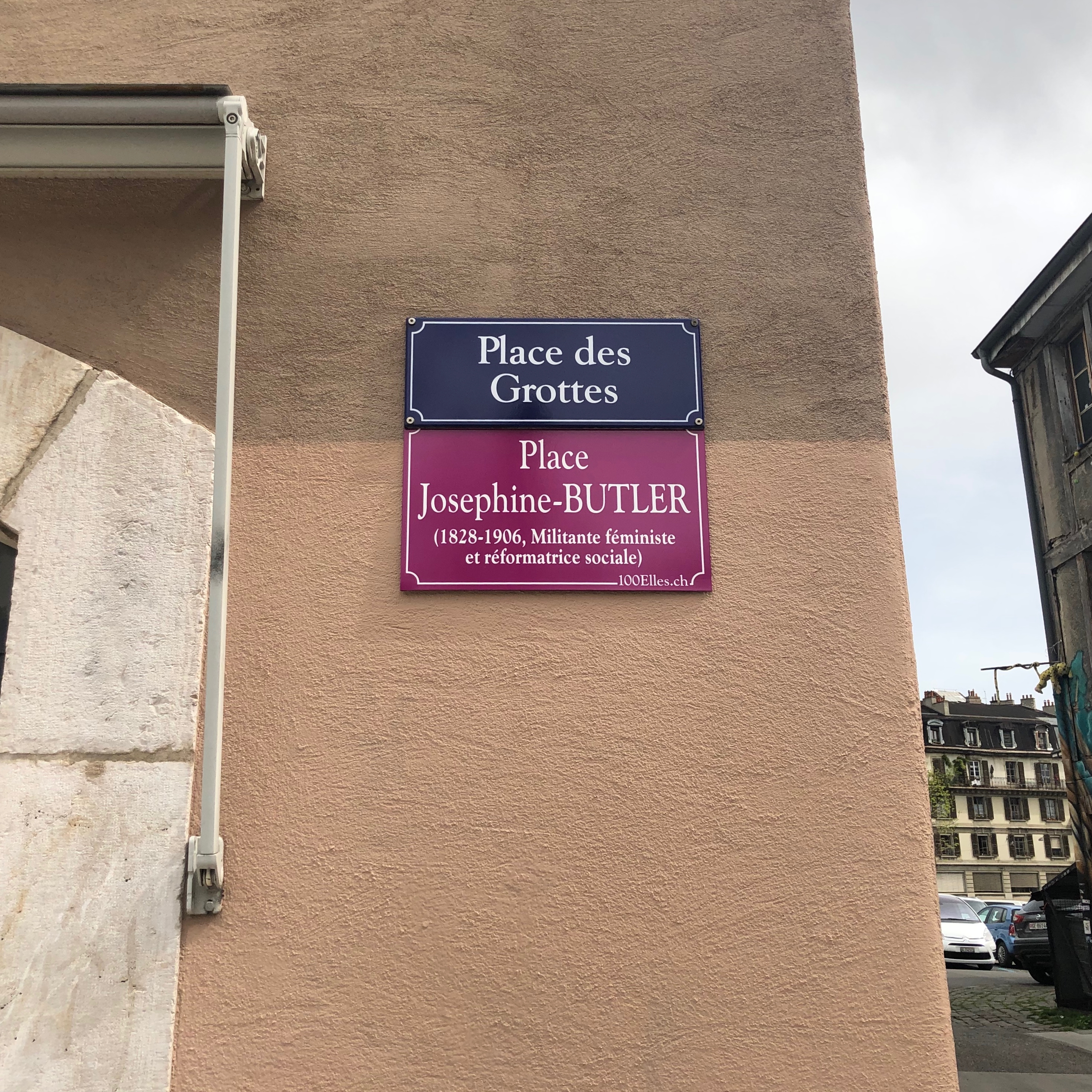 plaque de rue temporaire apposée dans le cadre du projet 100elles à Genève en 2019